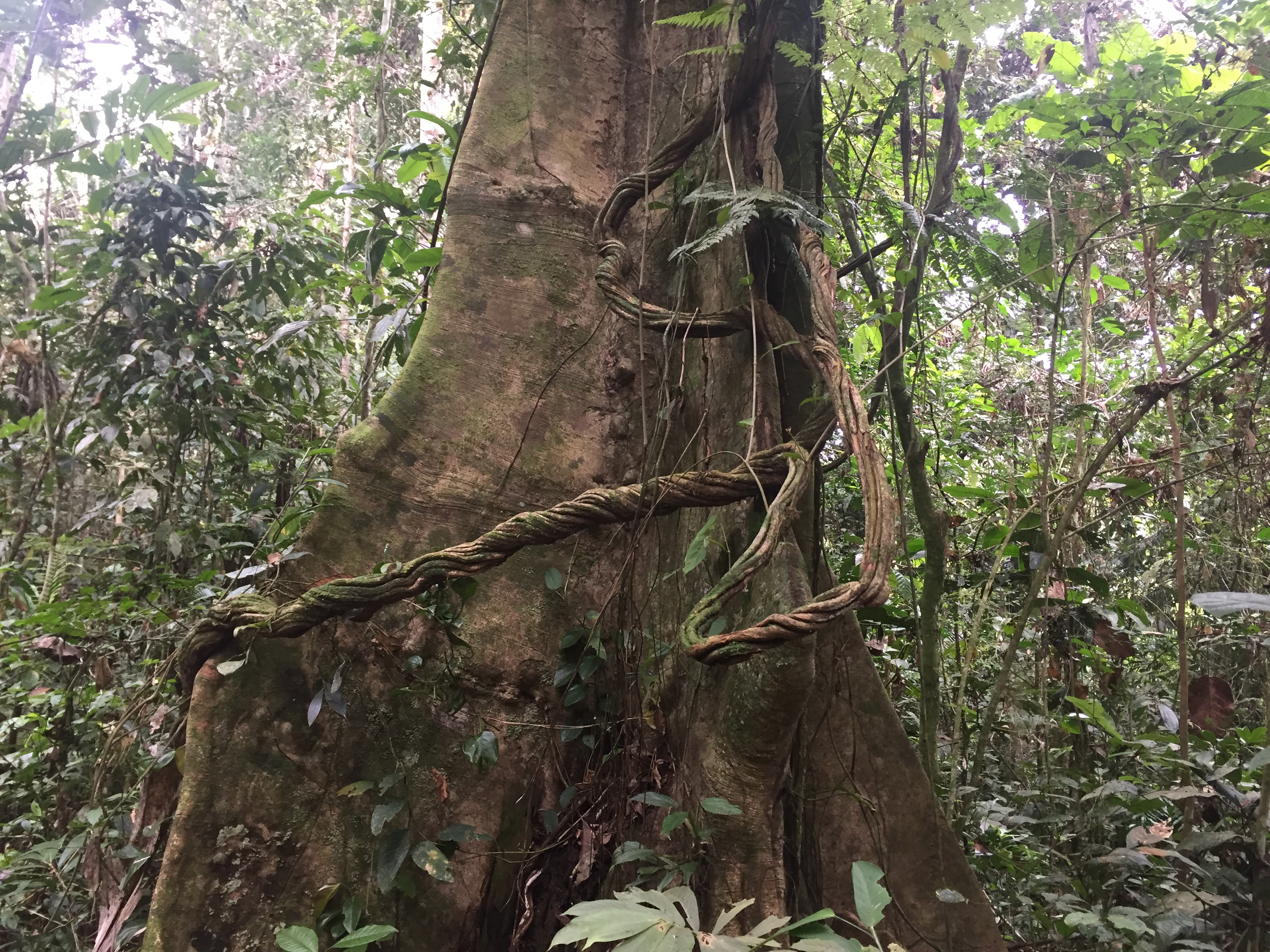 Liane vor einem Urwaldriesen im Cuyabeno Wildtier-Reservat, Ecuador